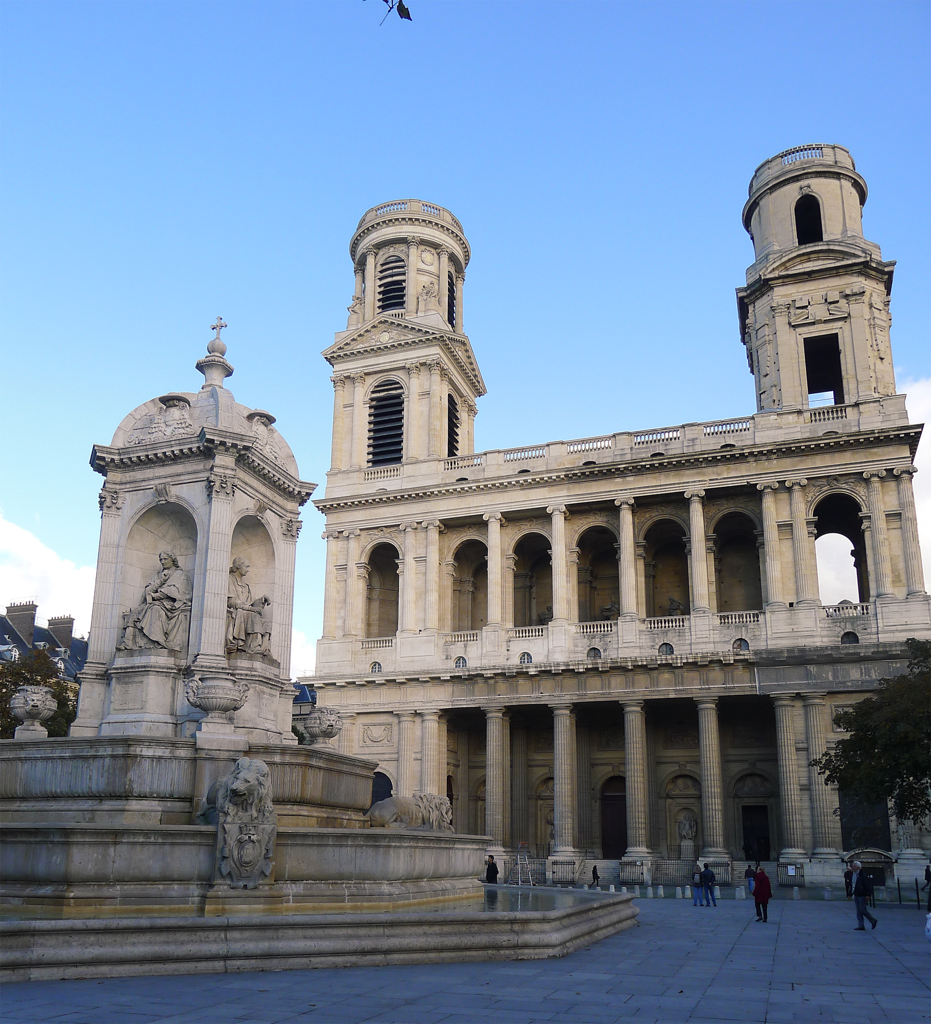 Église Saint-Sulpice - Paris VI .